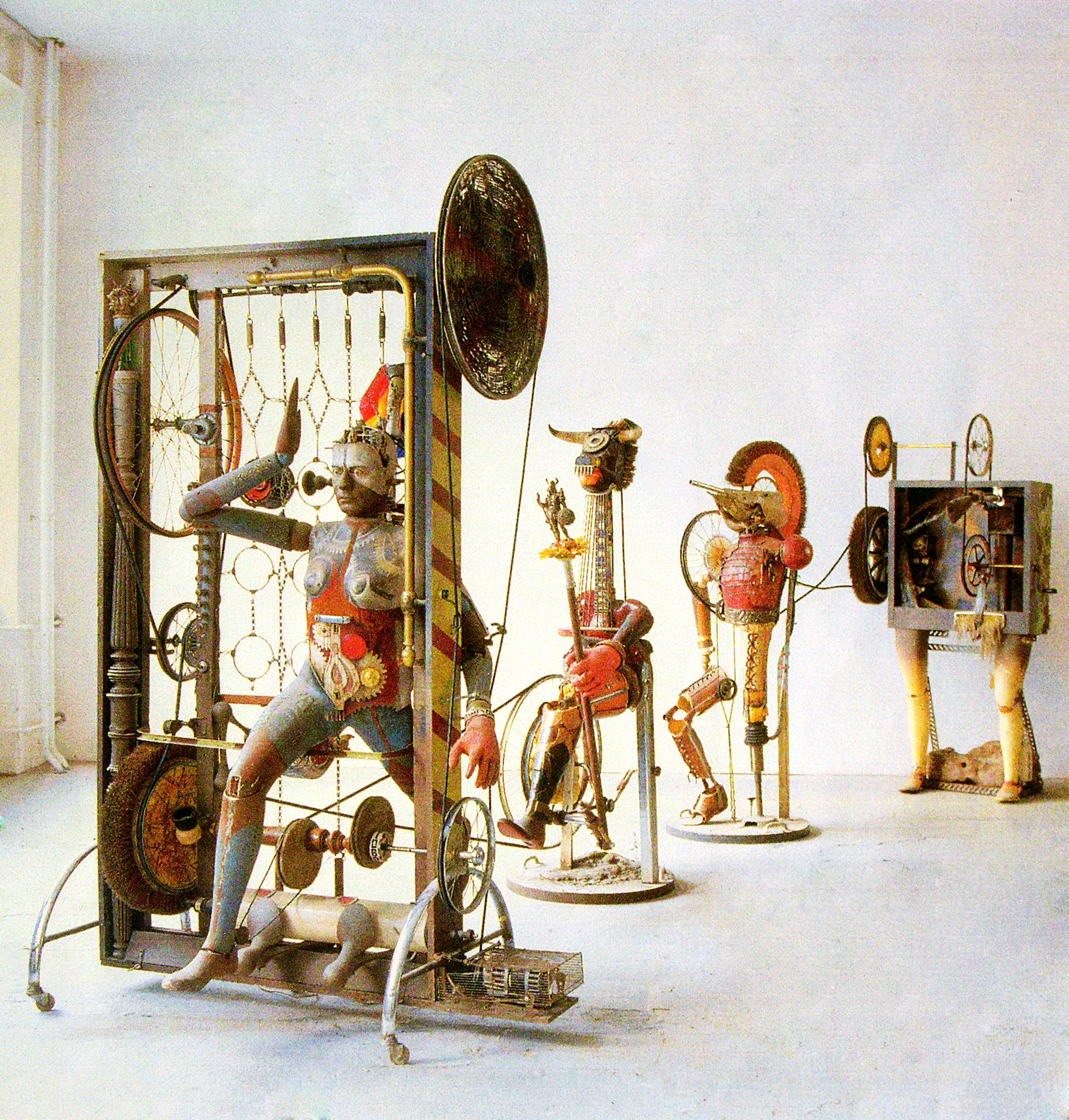 Foto von Objekt von Michael Schulze